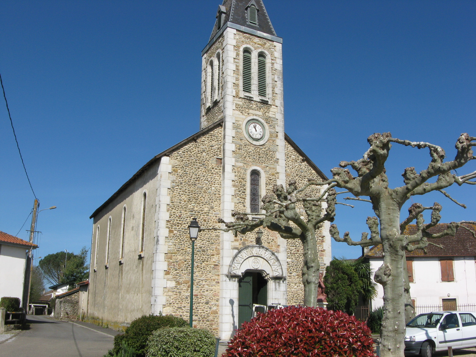 Eglise de Saint-Dos (Pyrénées-Atlantiques) (Pyrénées).